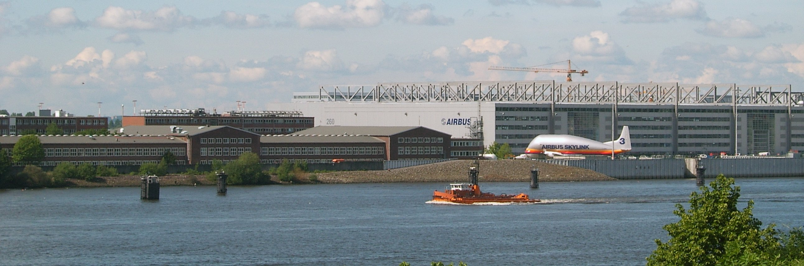 Hamburg, Finkenwerder, Werkgelände EADS